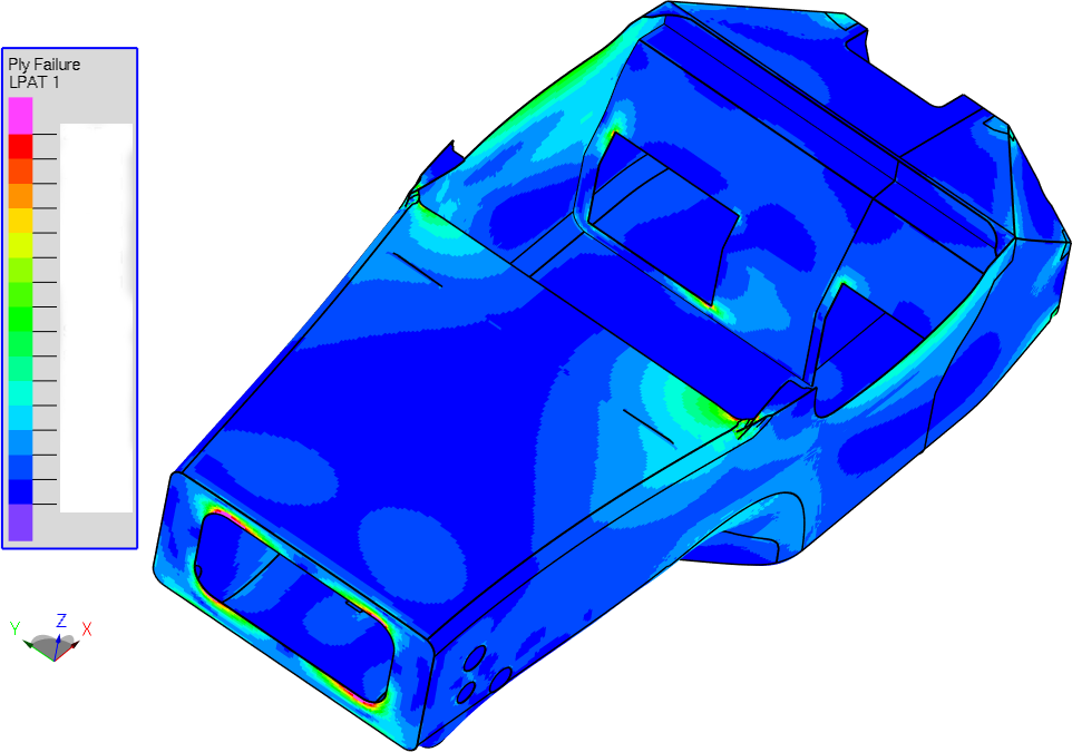 Schichtversagenskriterium (Bild:VisPER)